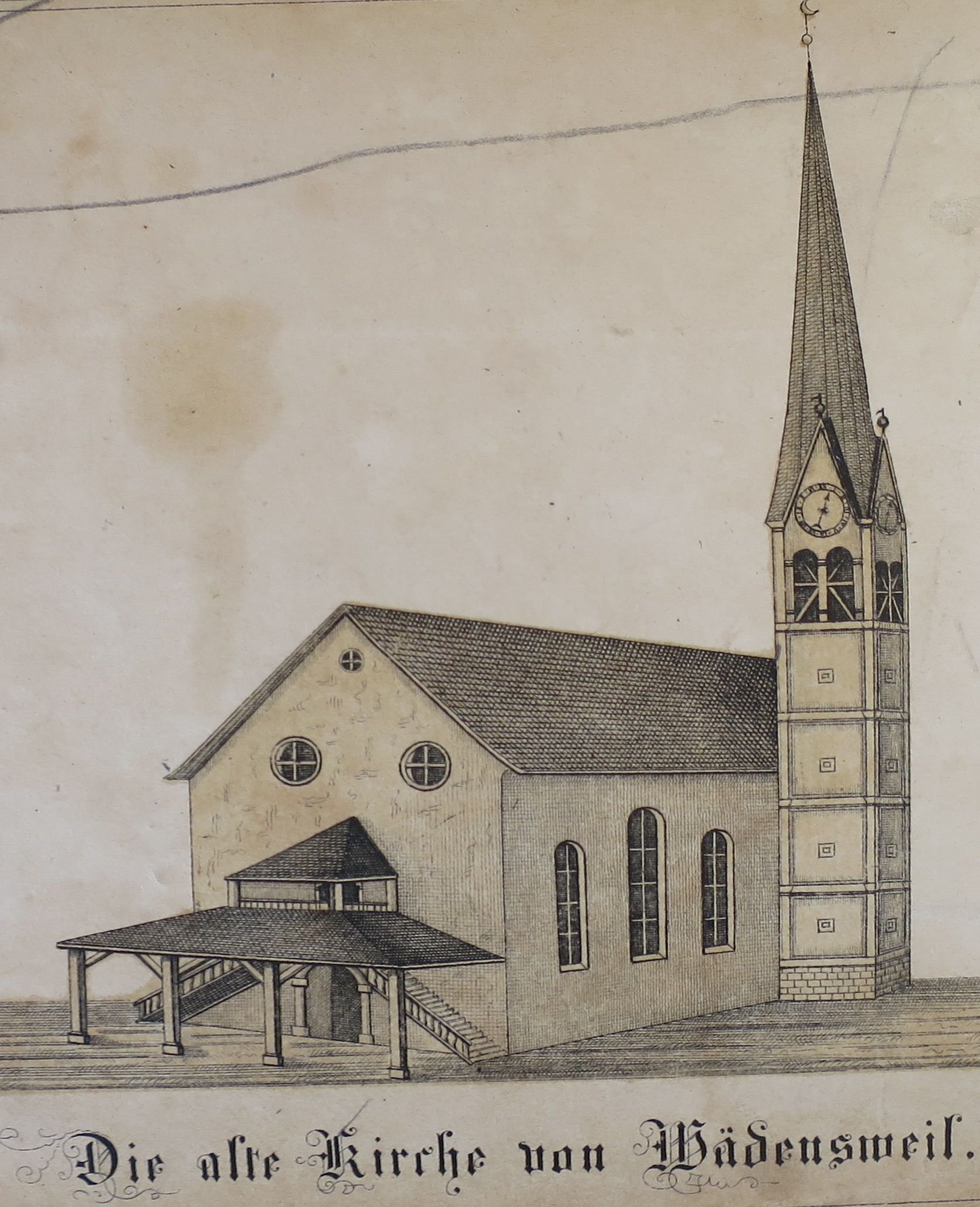 Frontispiz der 1764 abgebrochenen Kirche in Geschichte der Herrschaft und Gemeinde Wädensweil" von Johann heinrich Kägi, 1867.